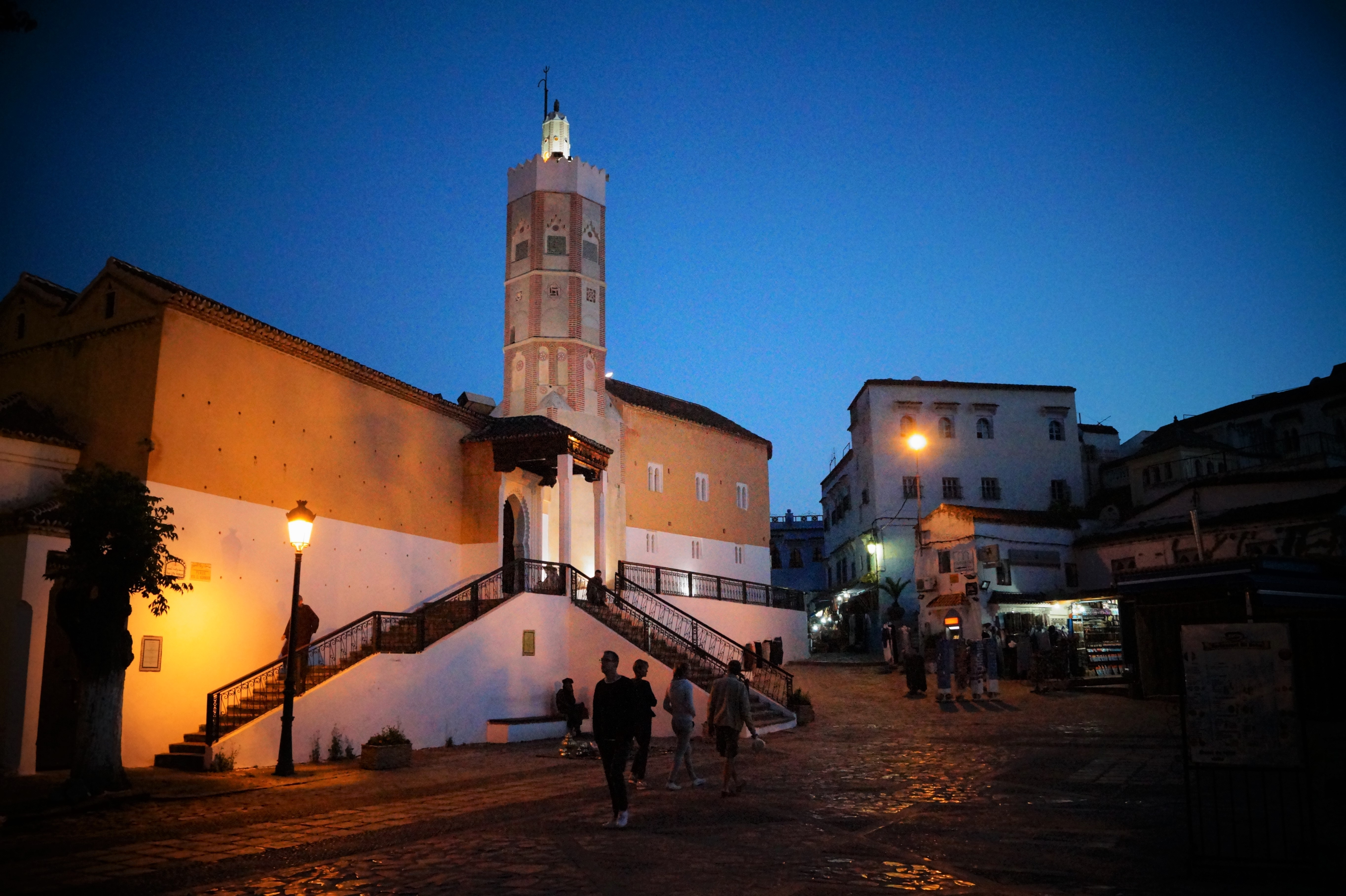 Plaza Uta Hamam o Uta El Hammam, en la ciudad de Chefchauen o Chauen, al norte de Marruecos y al pie de la montaña Rif.